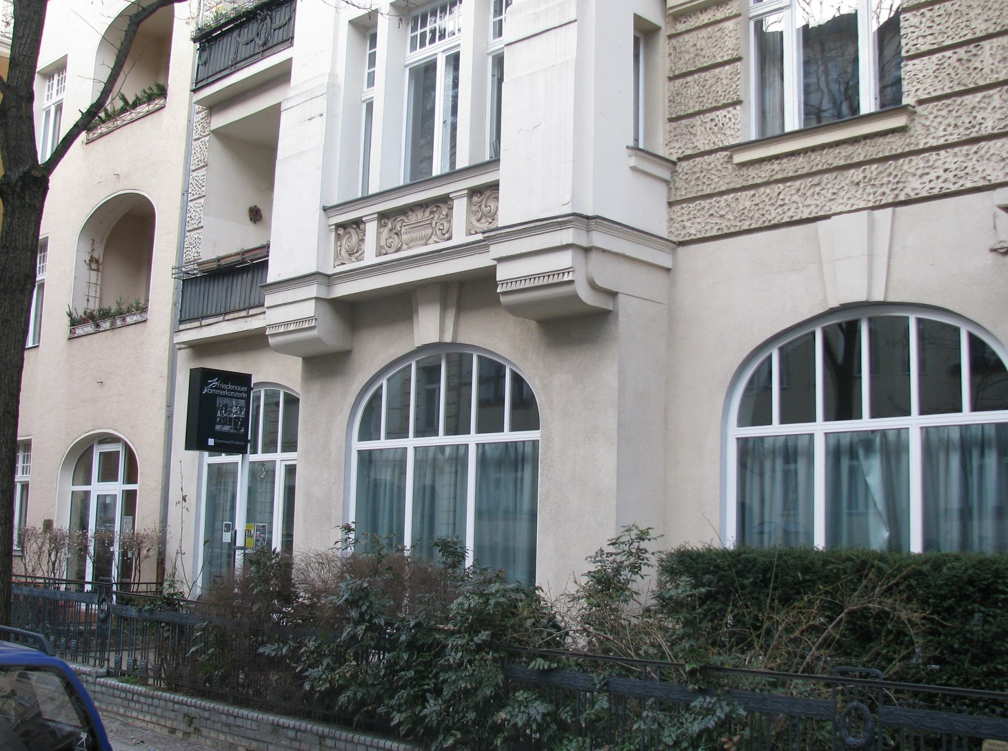 Friedenau Kammermusiksaal Isoldestr. 9 außen